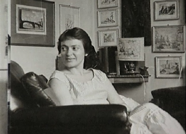 Elena Bono